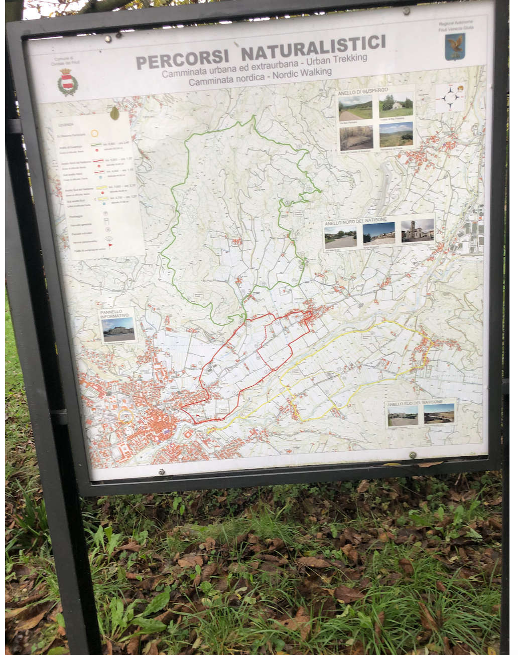 Segnaletica per Castello di Guspergo